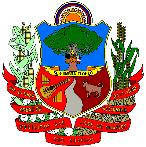 Escudo del municipio San José de Guaribe, estado Guárico, Venezuela